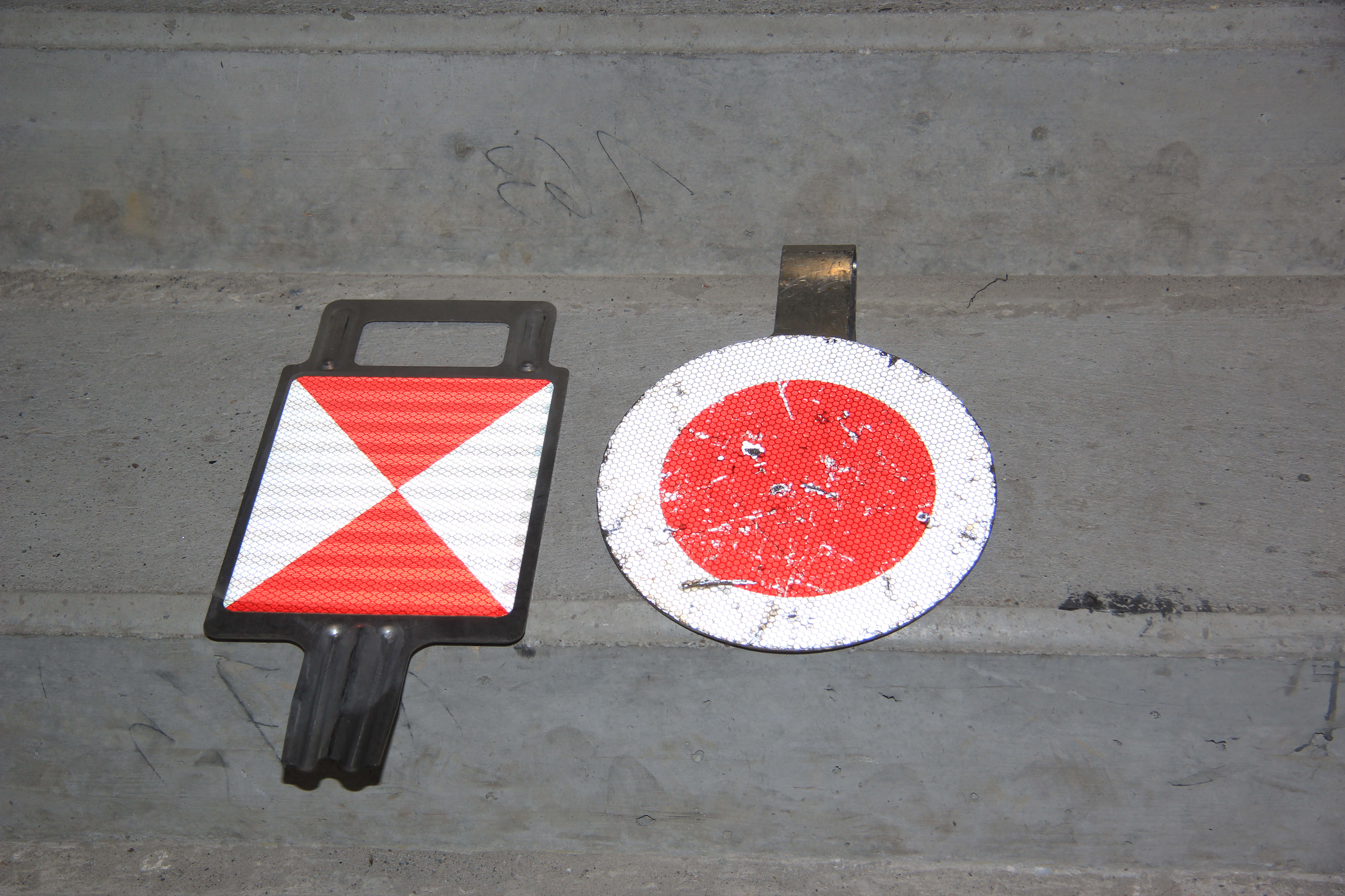 Zugschlusstafeln, links in Deutschland, rechts in Österreich